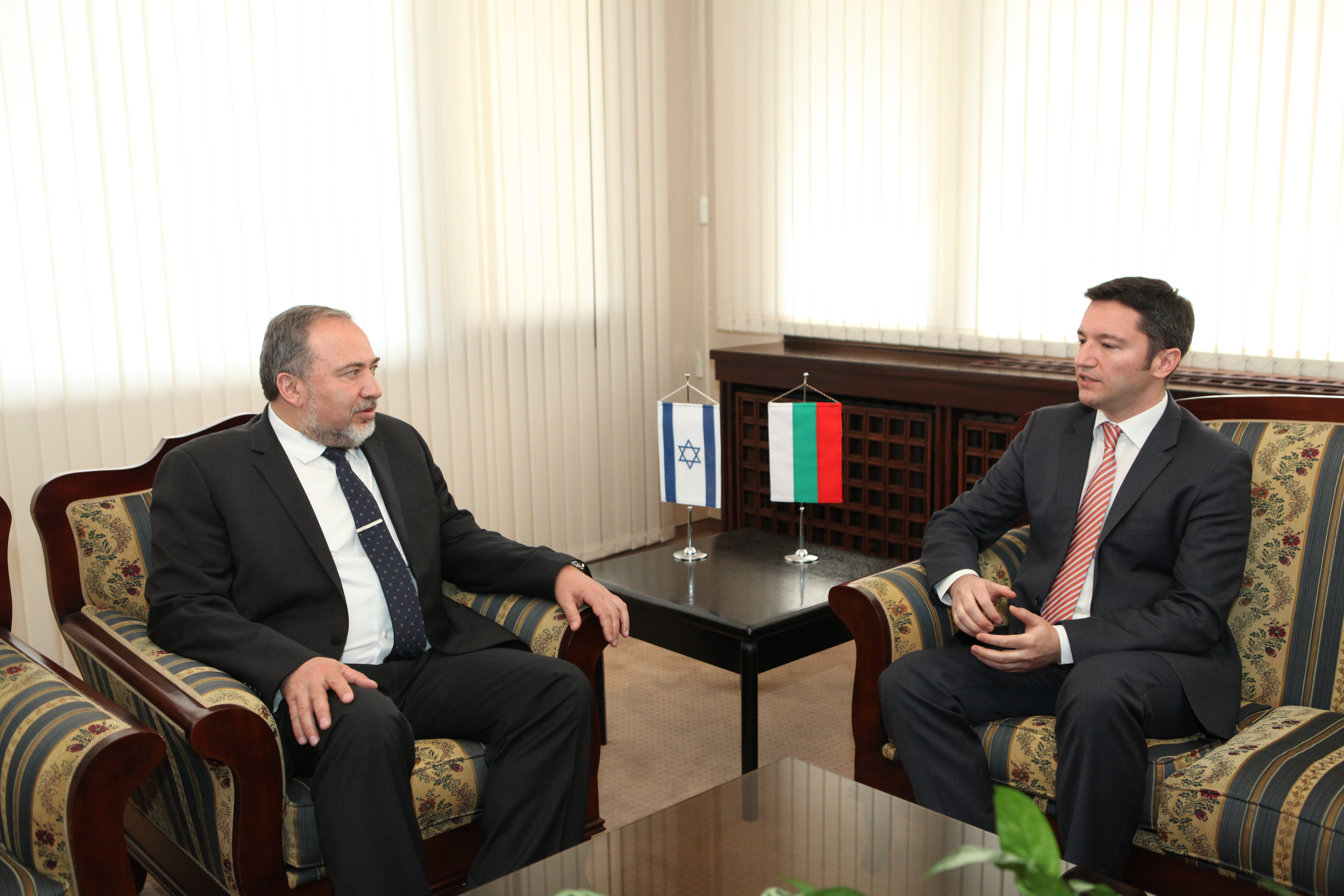 Министър Вигенин и министър Авигдор Либерман